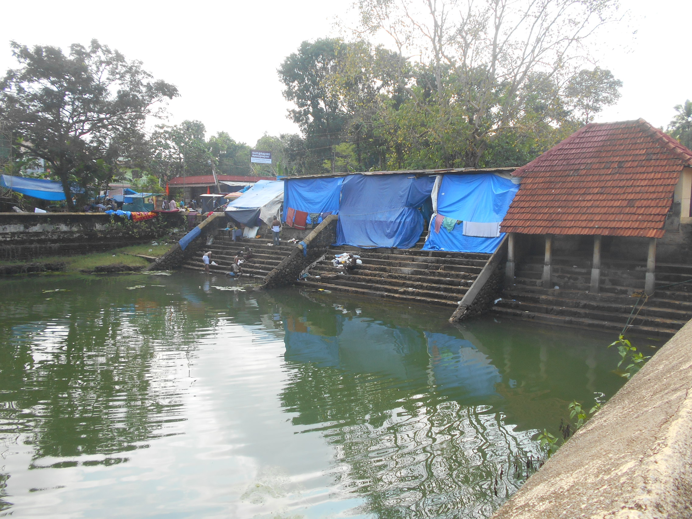 ഓമല്ലൂർ ശ്രീരക്തകണ്ഠസ്വാമി ക്ഷേത്രത്തിലെ ക്ഷേത്രക്കുളം